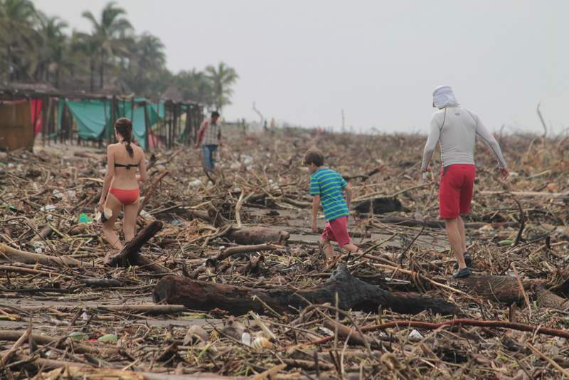 Estragos causados por el Huracán Ingrid y tormenta Manuel. En la zona "diamante" (Acapulco, Guerrero).